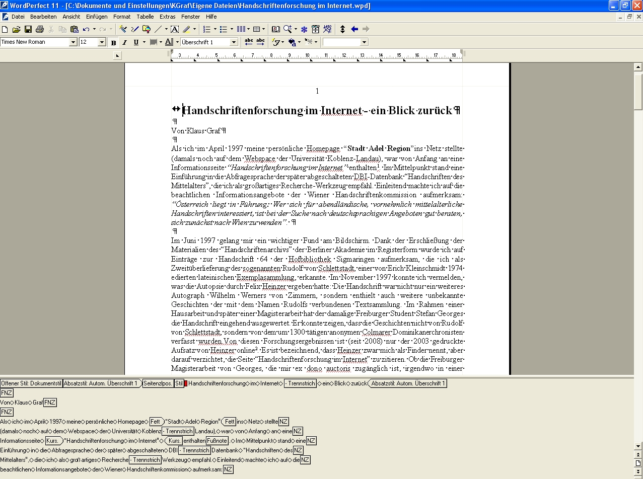 Text in Wordperfect 11 mit Steuerzeichendarstellung